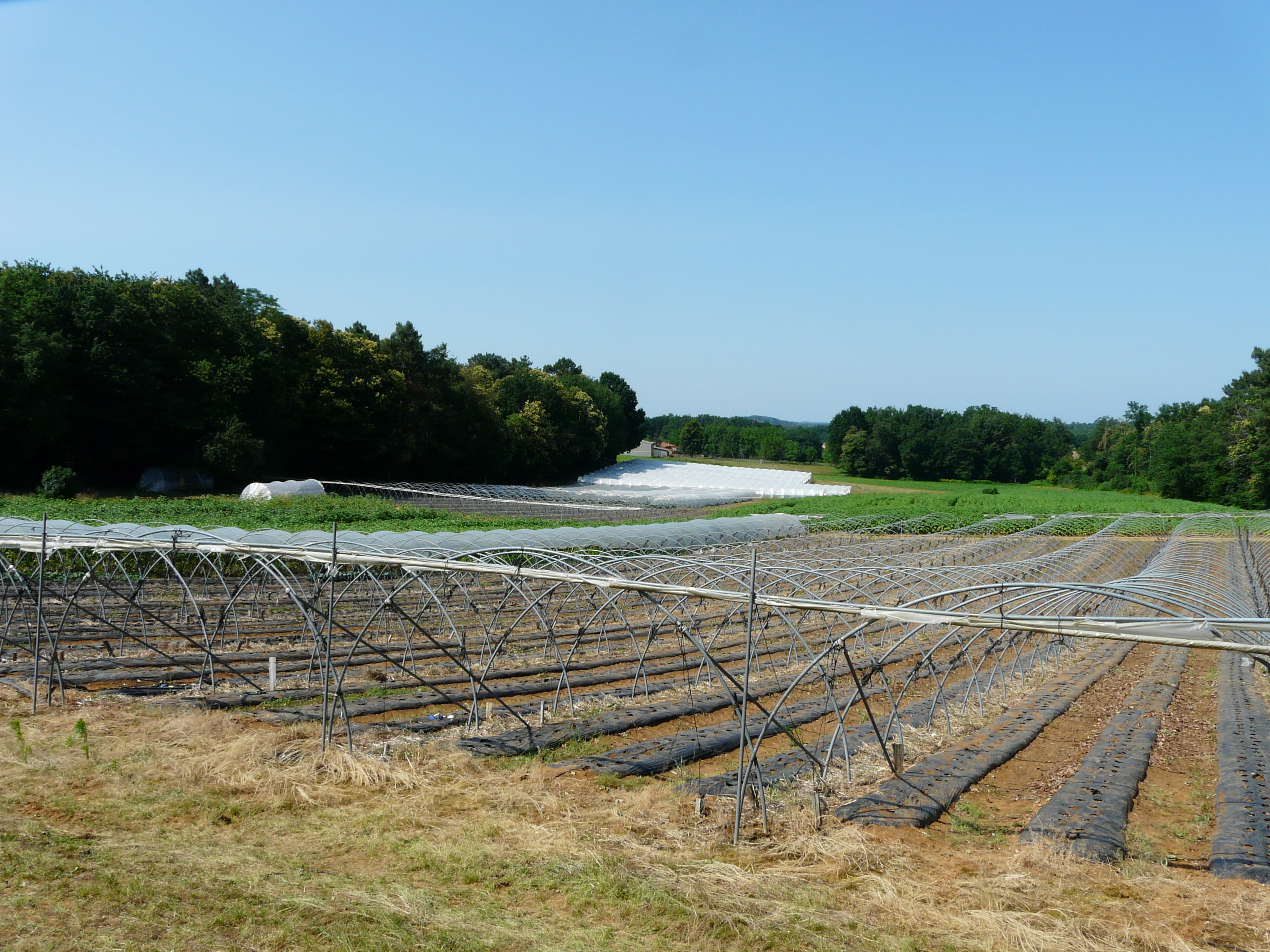 Tunnels de fraisiculture le long de la route départementale 42, Veyrines-de-Vergt, Dordogne, France.